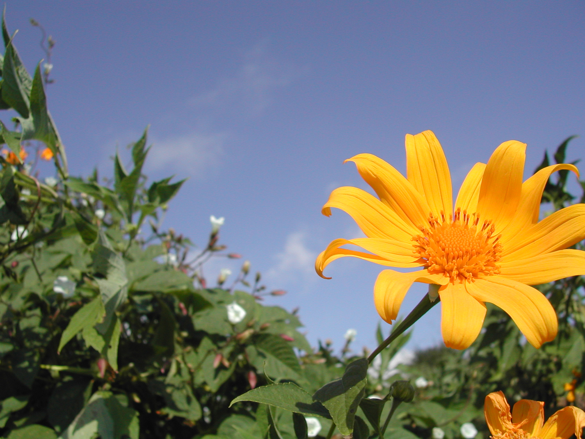 Photo de la flore à proximité du golf de Bassin Bleu, dans les Hauts de l'Ouest de la Réunion. Thitonia diversifolia (Hemsl.) A. Gray.